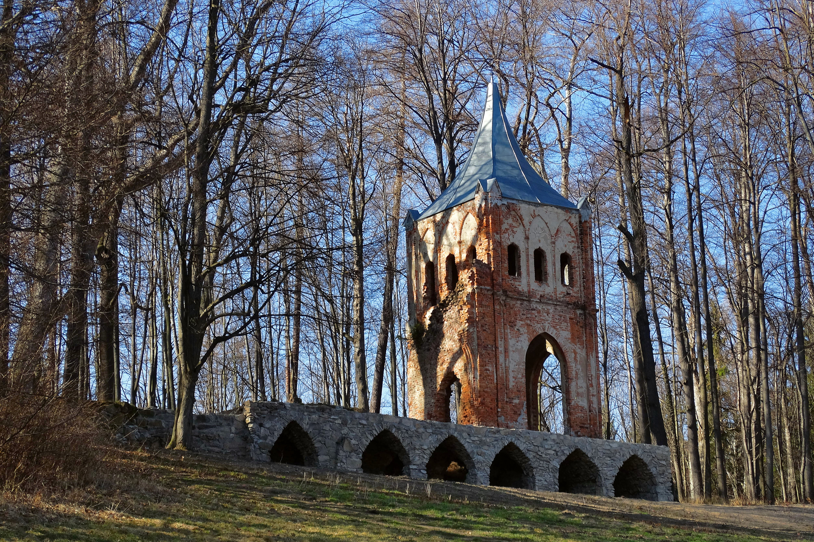 Ruiny Opactwa na zboczu góry Mrowiec w Bukowcu